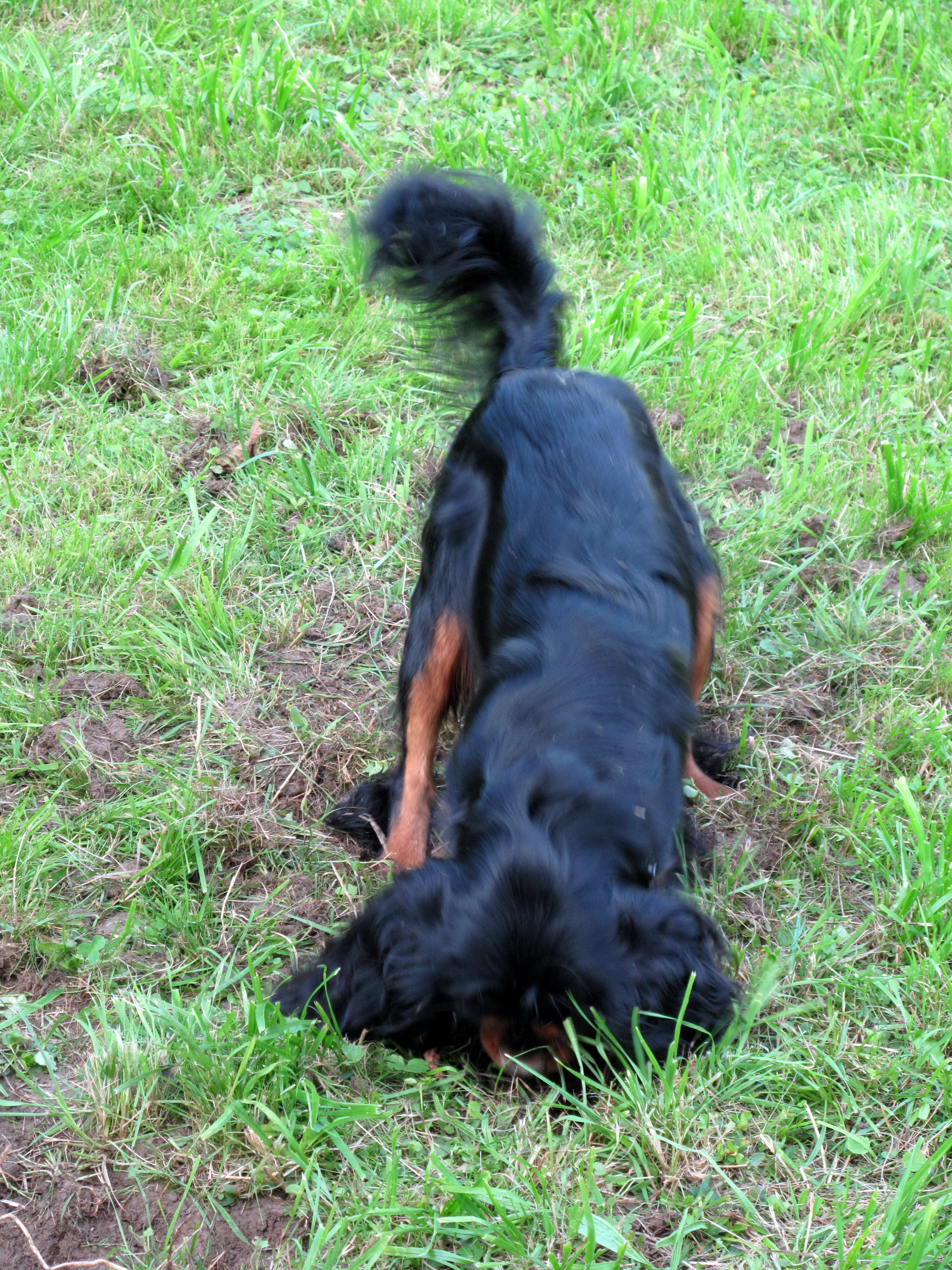 Kavalír španěl